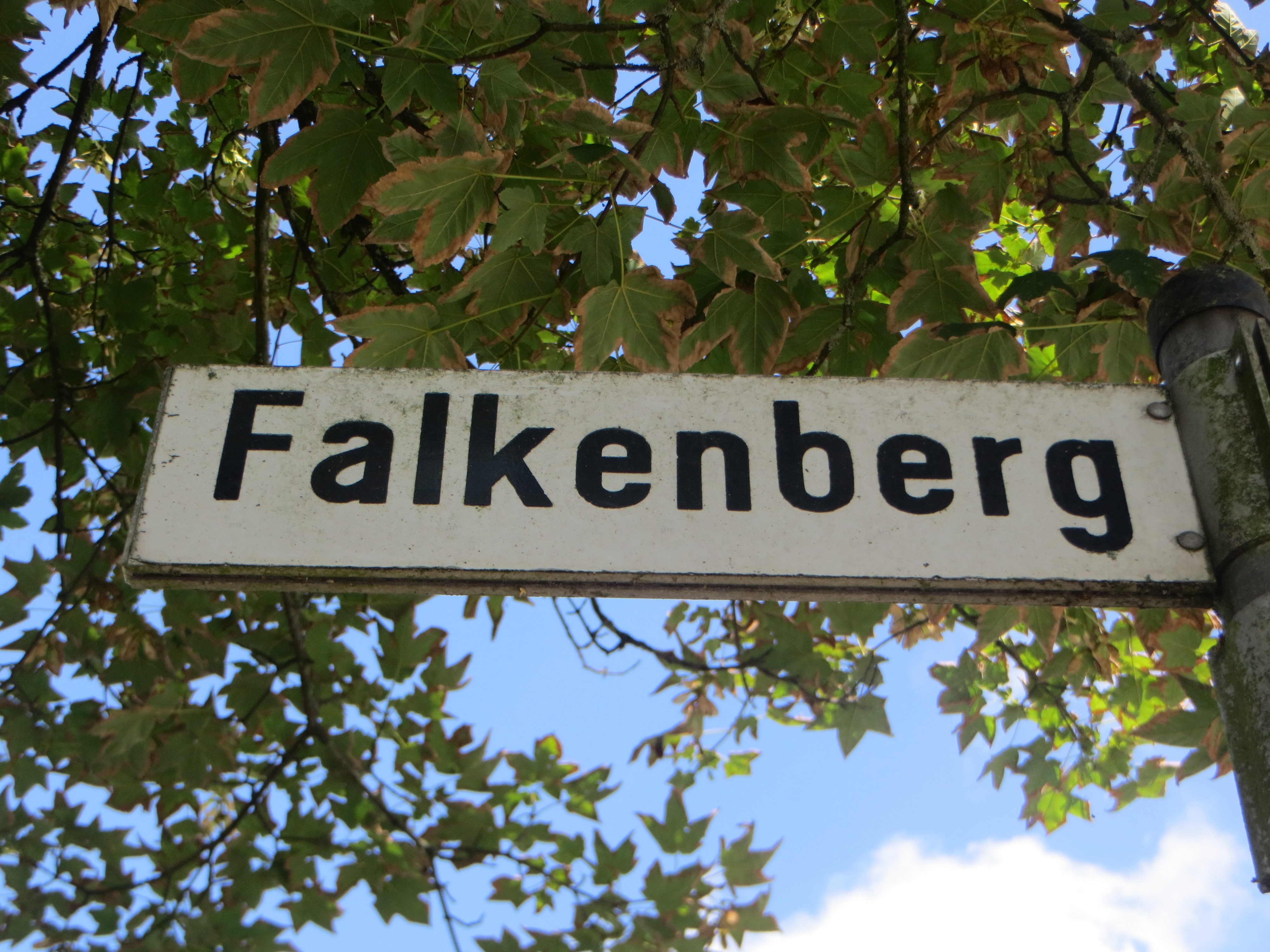 Straßenschild Falkenberg (Flensburg)